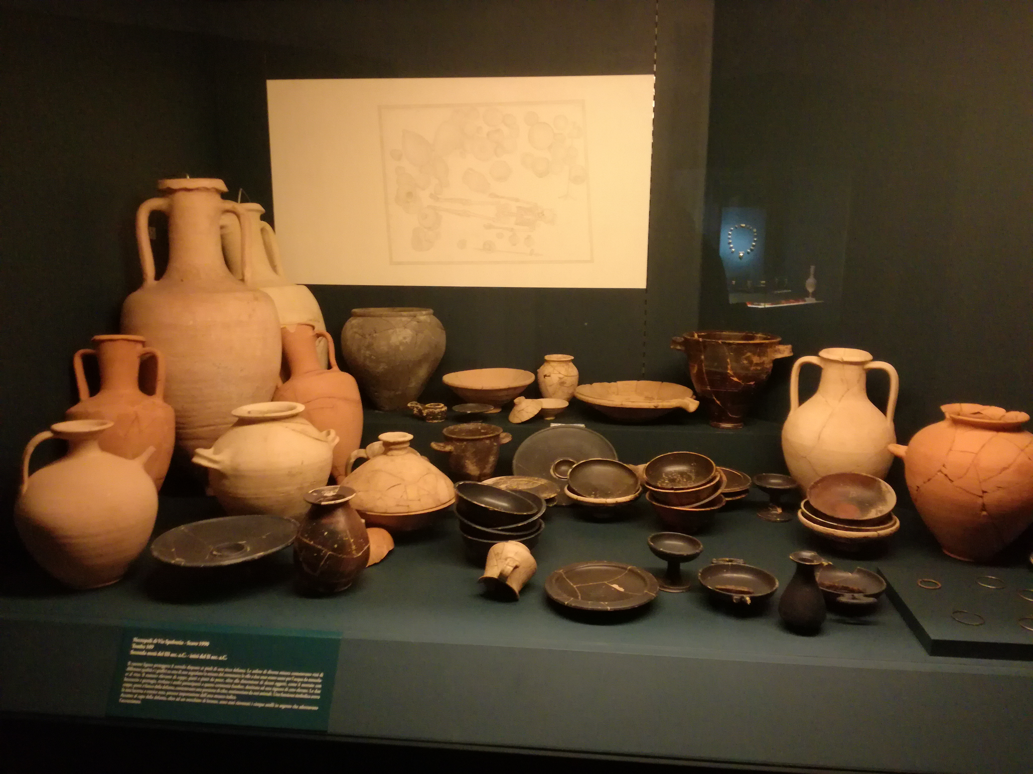 Vetrinetta con reperti archeologici situata nella sezione etrusca del Museo Archeologico Nazionale di Adria